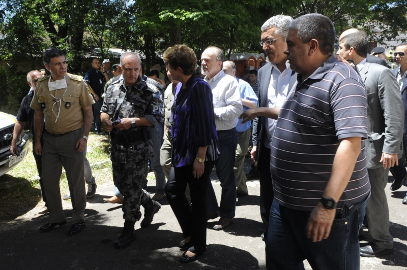 Presidente Dilma encontra parentes de vítimas e feridos do incêndio na Boate Kiss na cidade, que fica a 300 quilômetros da capital do estado Porto Alegre.